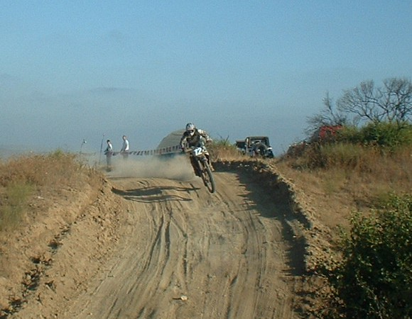 Motorcycle baja 500